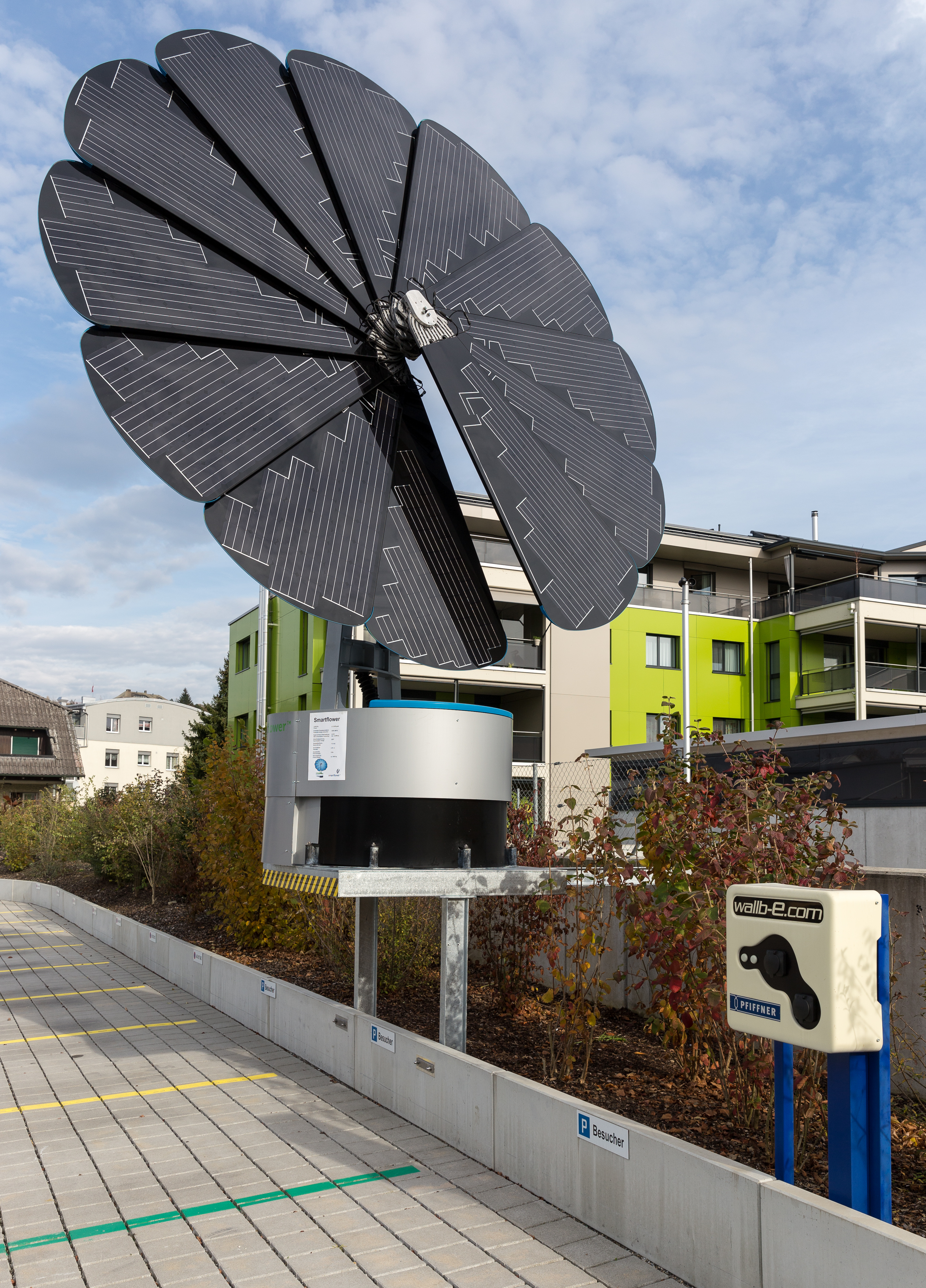 Von der Sonne in den "Tank": Smartflower Photovoltaik-Blume versorgt e-Auto-Ladestelle in Hirschthal AG, Schweiz.